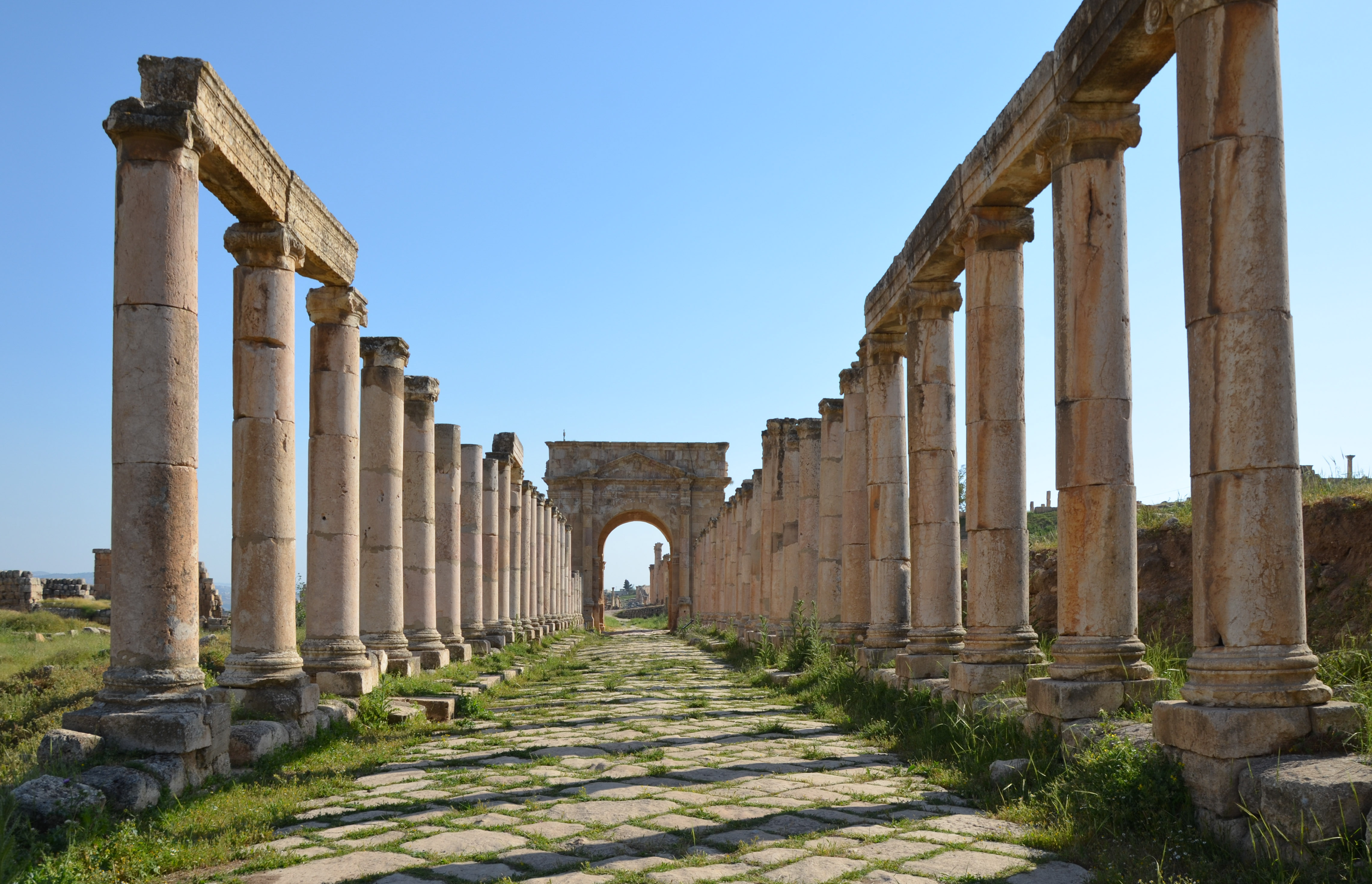 Gerasa, Jordan